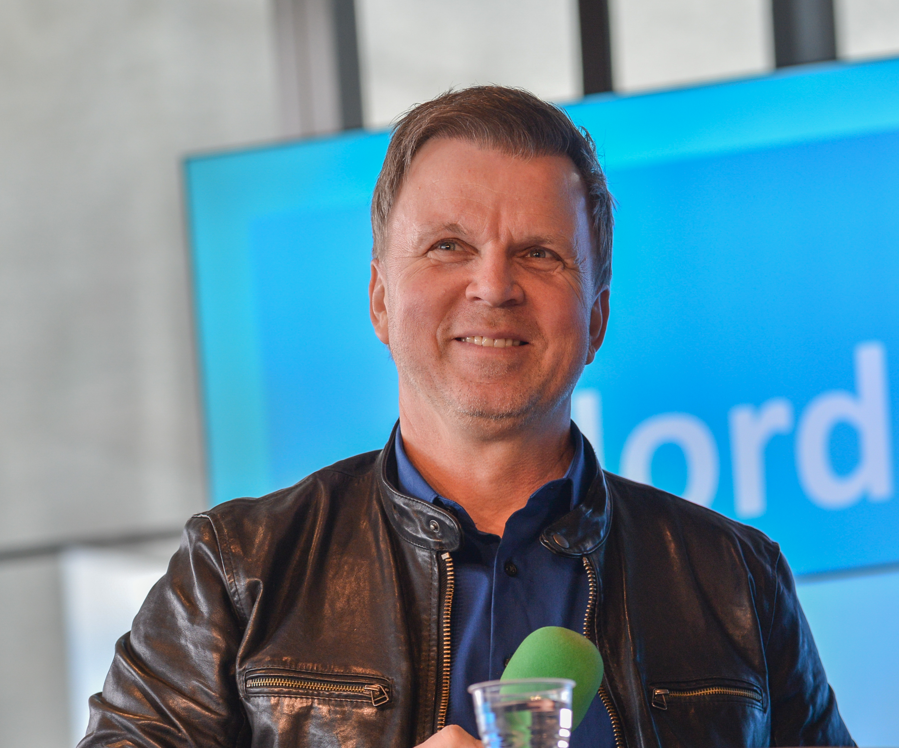 Richard Herrey intervjuas i Nordegren & Epstein i P1 på Kulturhuset Stadsteatern i Stockholm den 26 april 2018 i samband med hans kandidatur till Sveriges riksdag i valet senare i höst.